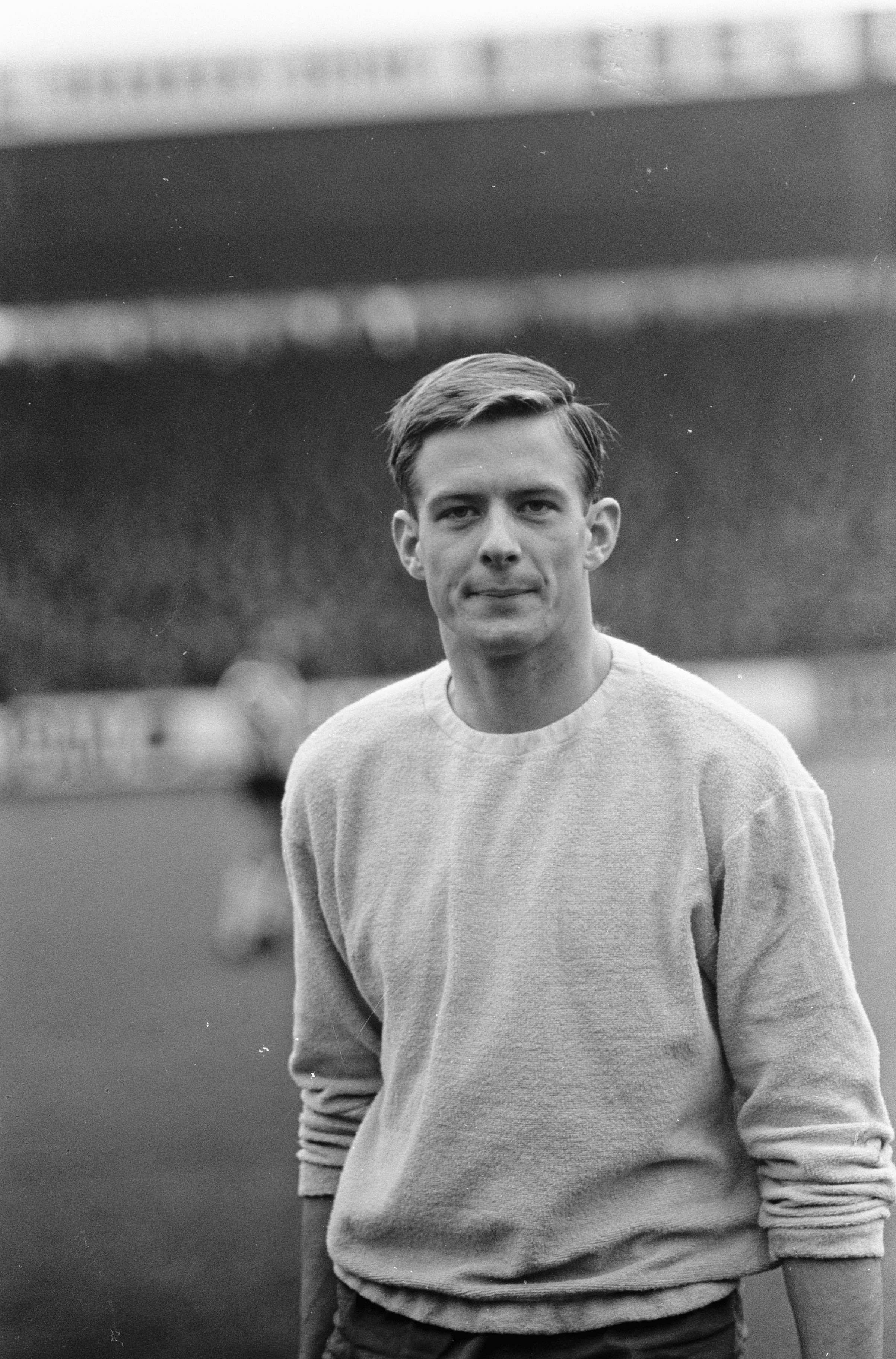 Collectie / Archief : Fotocollectie Anefo Reportage / Serie : Voetbalwedstrijd Go Ahead - Ajax te Deventer: 2-3 Beschrijving : Portret van Go Ahead keeper Nico van Zoghel Datum : 30 oktober 1966 Locatie : Deventer, Overijssel Trefwoorden : portretten, sport, voetbal Persoonsnaam : Zoghel, Nico van Instellingsnaam : Go Ahead Fotograaf : Jack de Nijs / Anefo Auteursrechthebbende : Nationaal Archief Materiaalsoort : Negatief (zwart/wit) Nummer archiefinventaris : bekijk toegang 2.24.01.05 Bestanddeelnummer : 919-7383